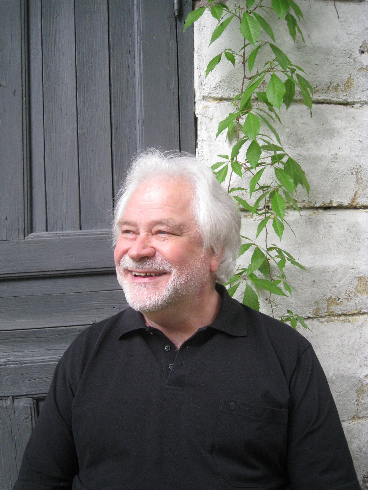 Teollinen muotoilija Heikki Kiiski